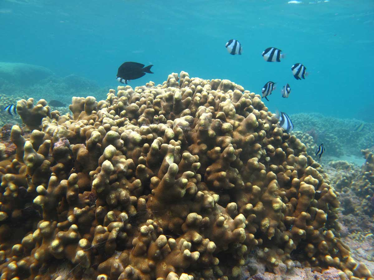 Corail Porites cylindrica (ou peut-être Porites nigrescens) à la Réunion.